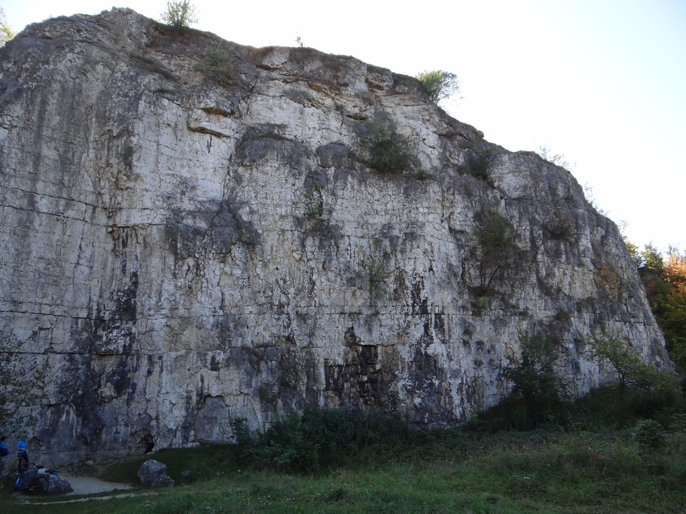 Skała Freney na Zakrzówku w Krakowie